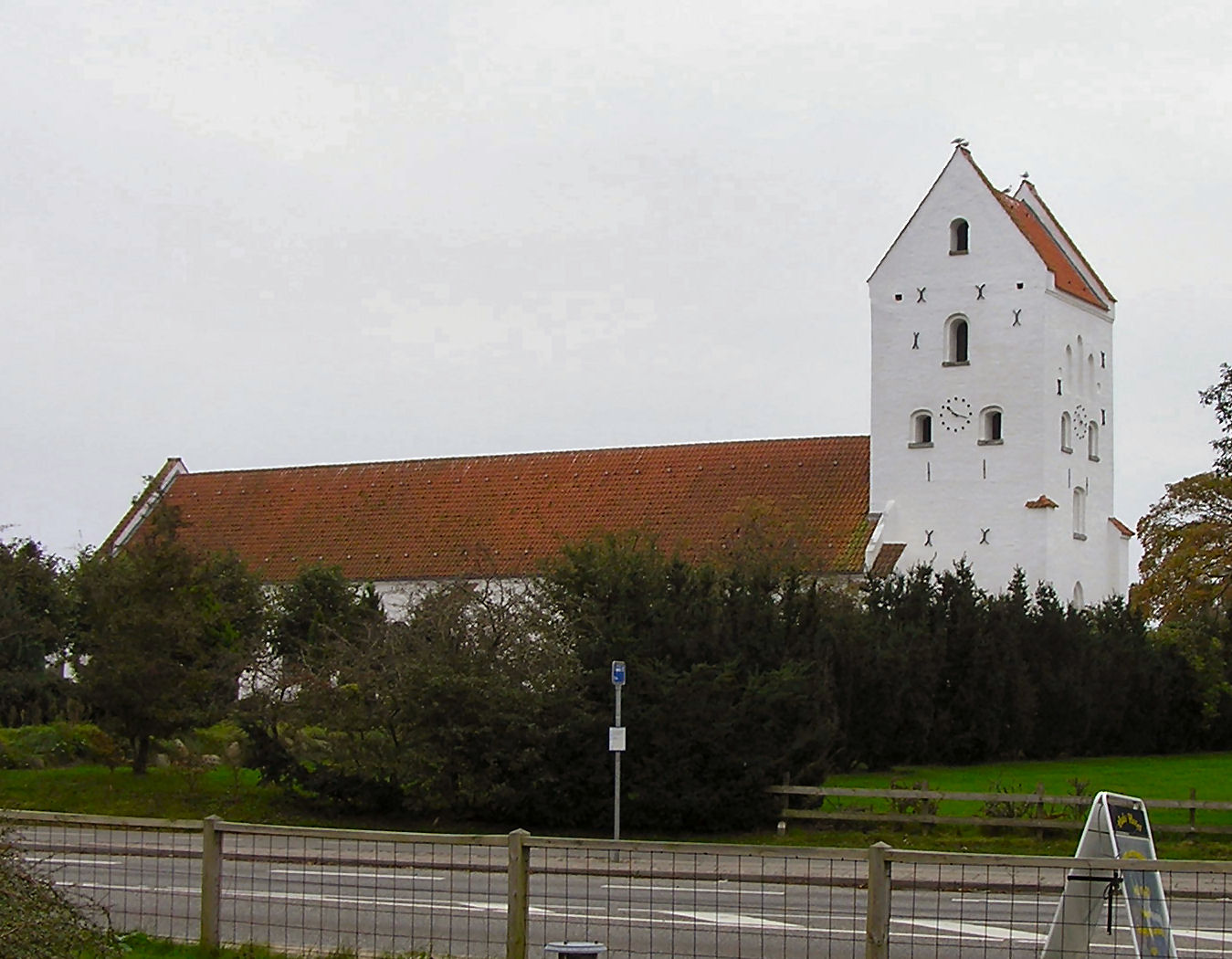 Hals Kirke,Aalborg Stift